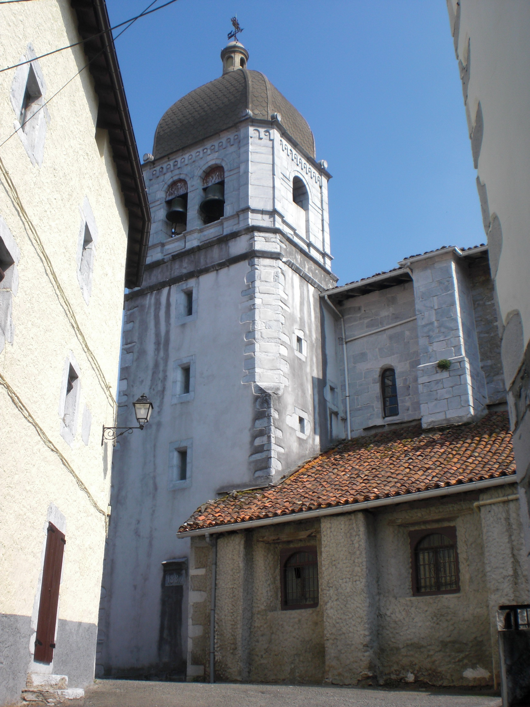 Arantzako eliza.